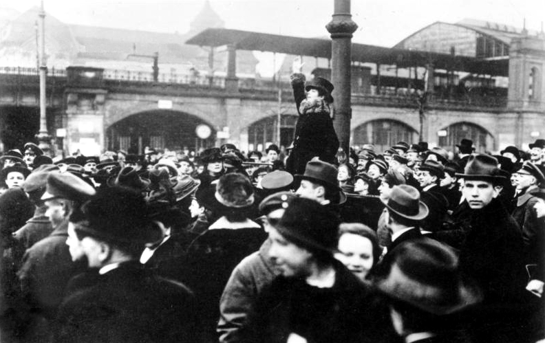 [Text auf Foto-Vorderseite:] Nationalversammlung in Berlin. Agitation durch die Schauspielerin Senta Söneland. Originalaufnahme W. Gircke [ADN-Text auf Foto-Rückseite:] Zentralbild / 3.3.1953 [Herausgabedatum] Agitation für die Wahl zur Nationalversammlung 1919. Die Schauspielerin Senta Söneland wirbt für die Wahl zur Nationalversammlung Information added by Wikimedia users.Januar 1919 am Berliner Bahnhof Zoo